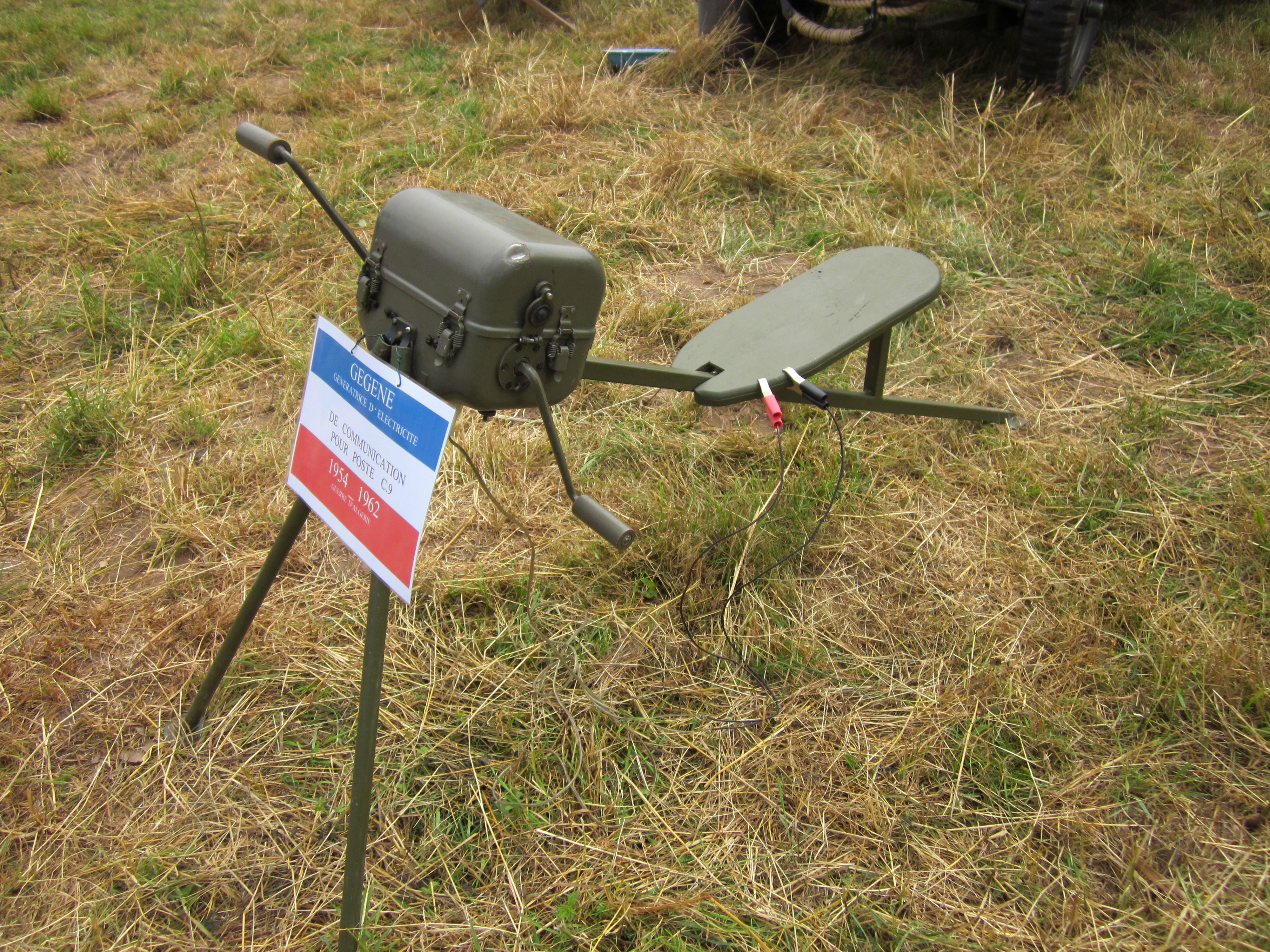 « Gégène » (terme de l'argot militaire français, diminutif de « génératrice ») : dynamo électrique manuelle en dotation dans l'armée de terre française de 1954 à 1962, utilisée pour fournir une alimentation électrique au poste de radio C5. Elle a été utilisée par certains militaires français durant la Guerre d'Algérie dans des interrogatoires pour torturer des personnes en leur appliquant les électrodes afin de faire circuler un courant électrique entre diverses parties du corps (article WP fr). Objet présenté lors d'une exposition de matériel militaire par des collectionneurs.